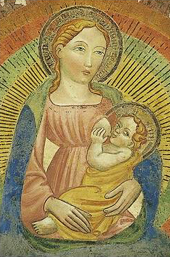 Madonna del rastrello